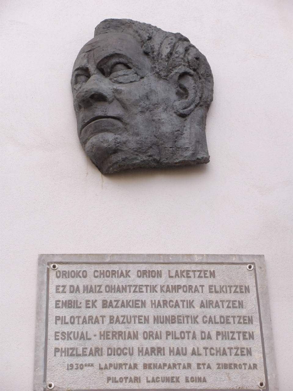 Orio (Gipuzkoa)